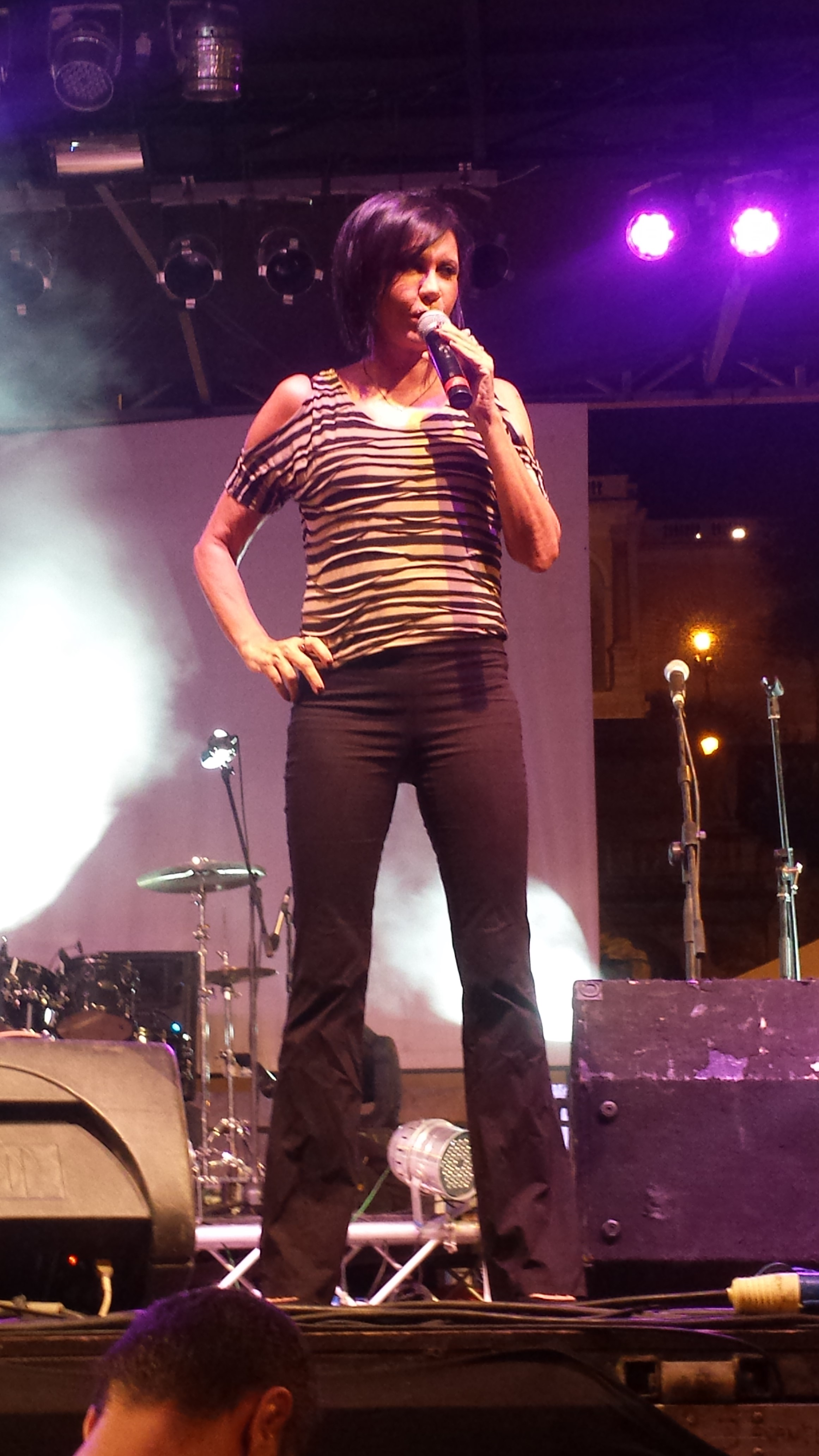 Fiordaliso in concerto a Roma (2015)